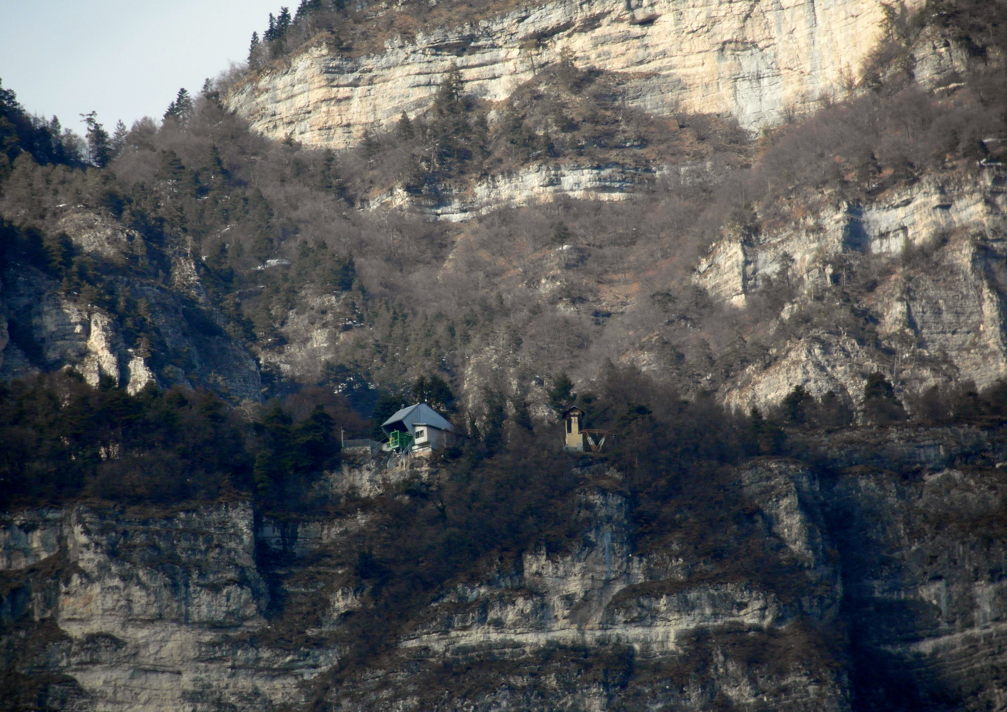 Stazione di arrivo della Funivia Mezzocorona-Monte